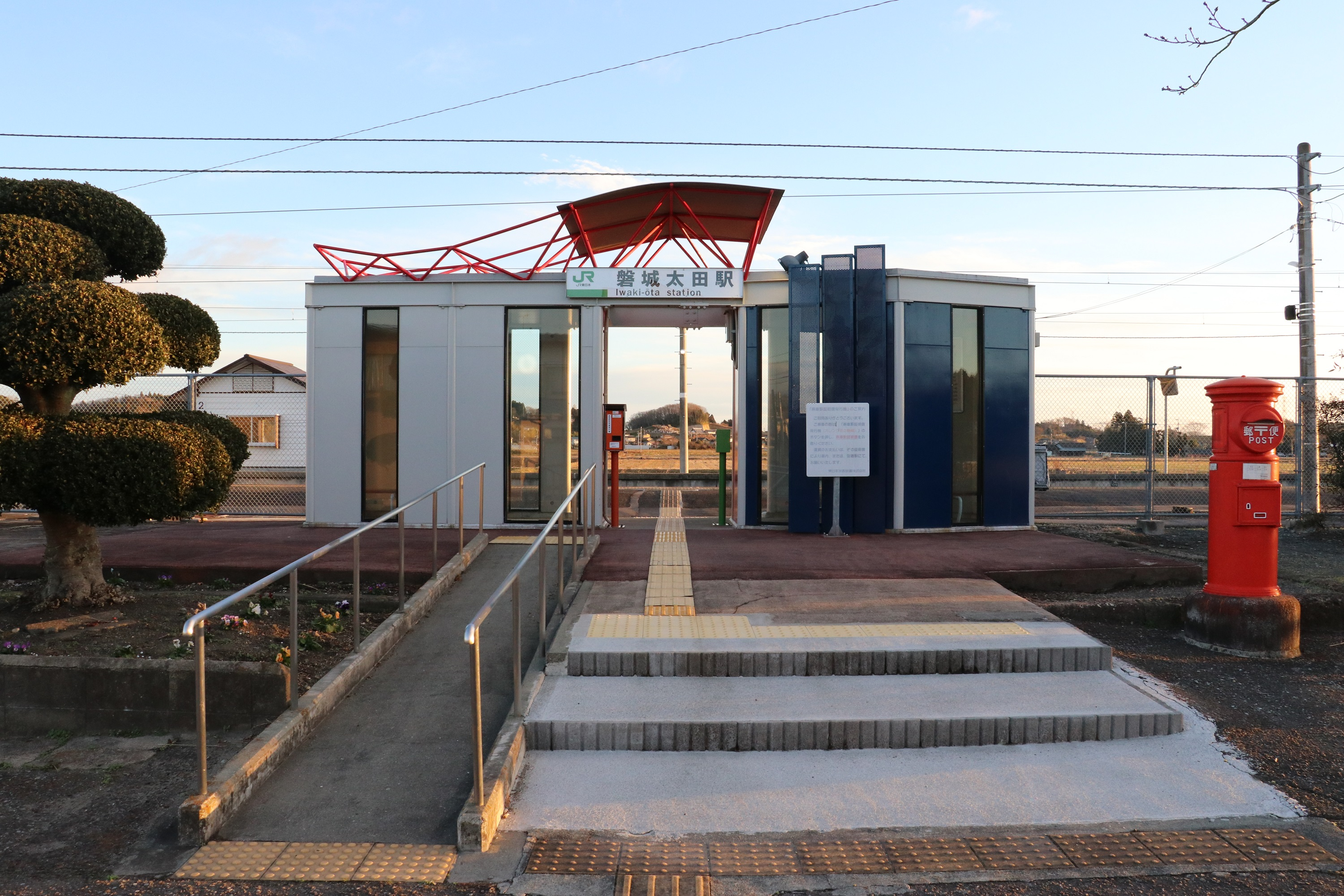 常磐線磐城太田駅